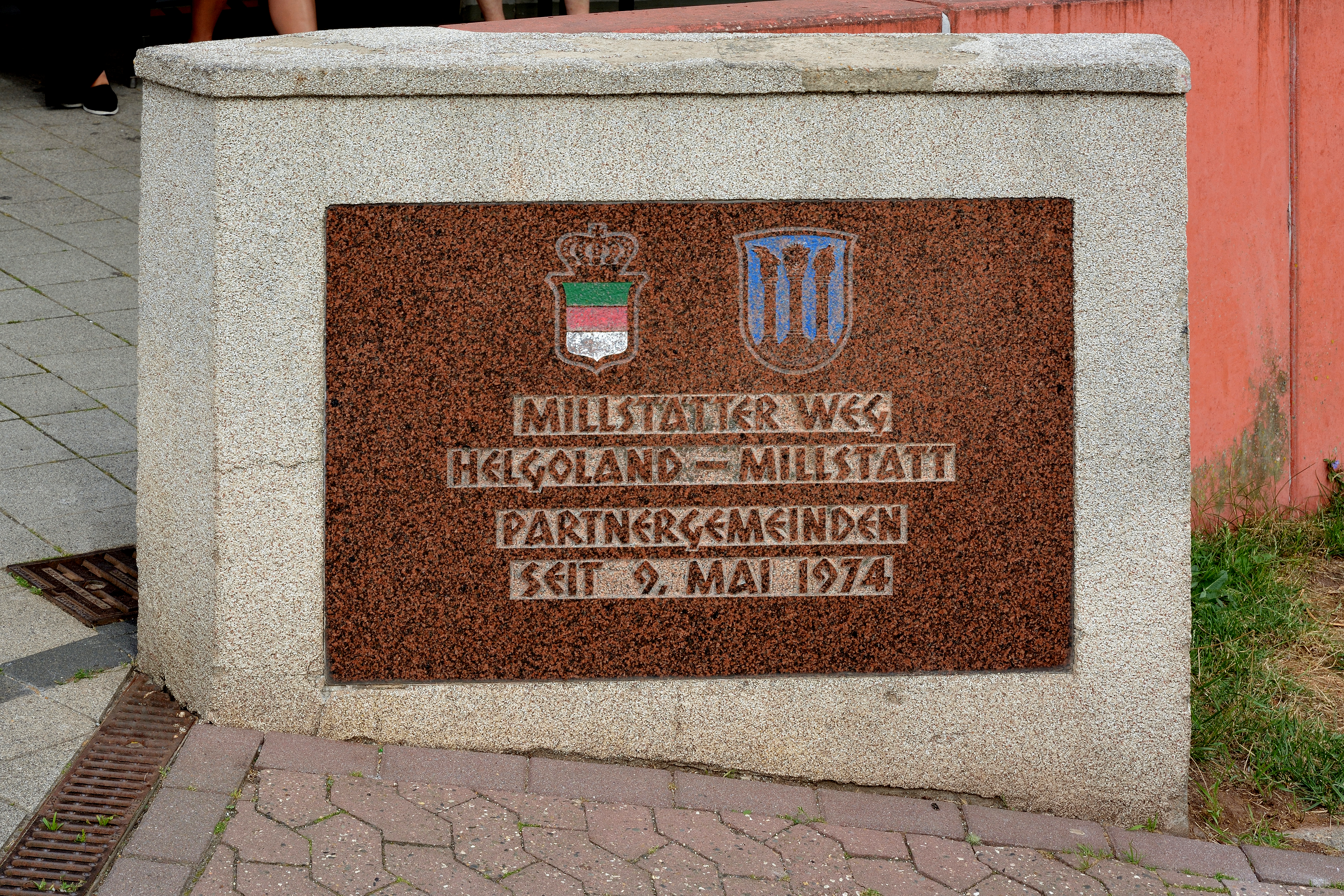 Bilder von Helgoland im Juli 2019Hinweis auf die Städtepartnerschaft mit Millstatt am See in Kärnten auf dem Oberland